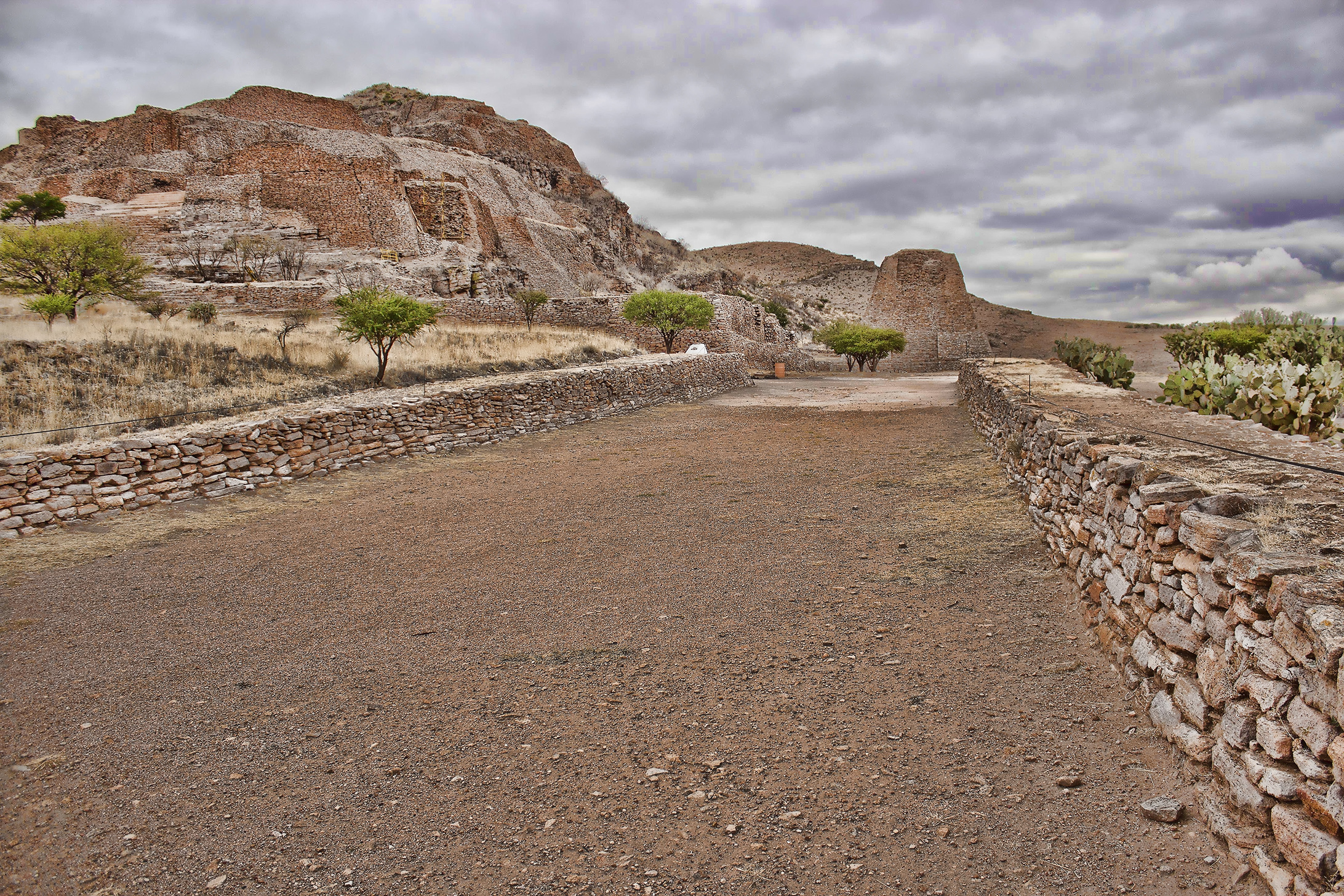 La Quemada